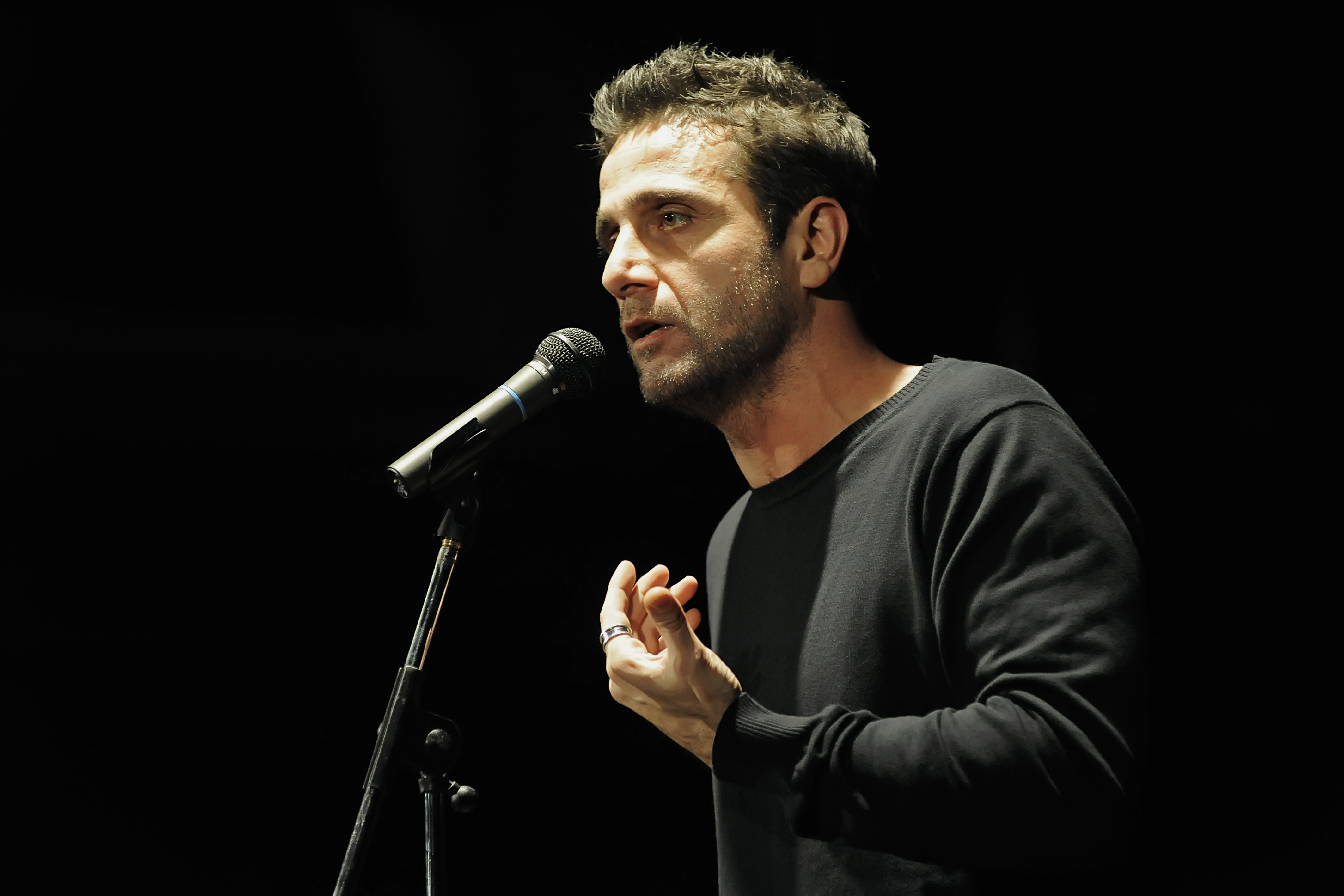 Gomorra in teatro